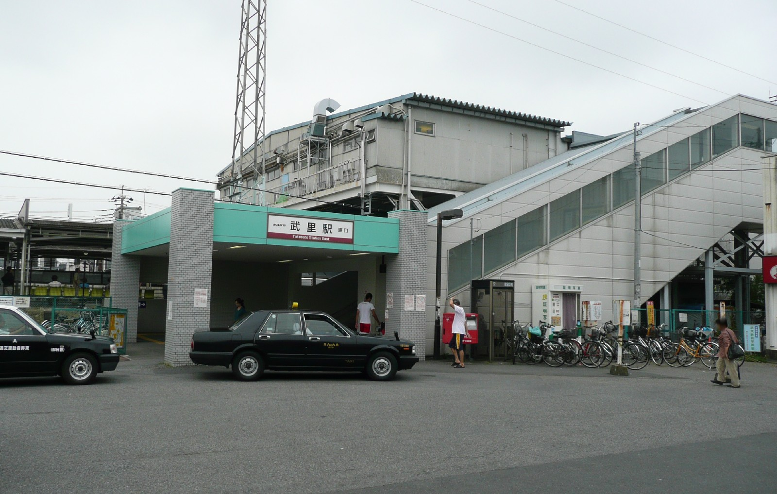 武里駅東口